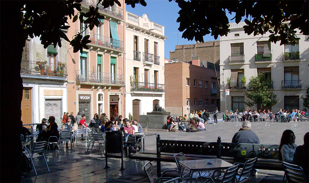 PlaÃ§a del Sol, GrÃ cia, Barcelona